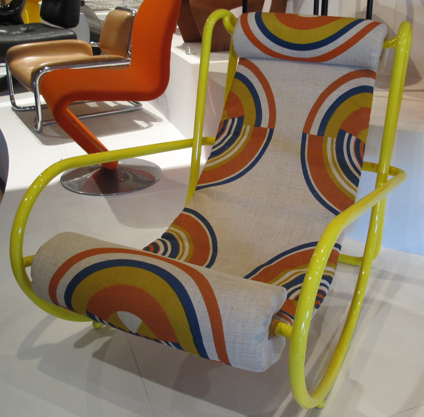 Poltrona Locus Solus - di Gae Aulenti esposta in Francia.